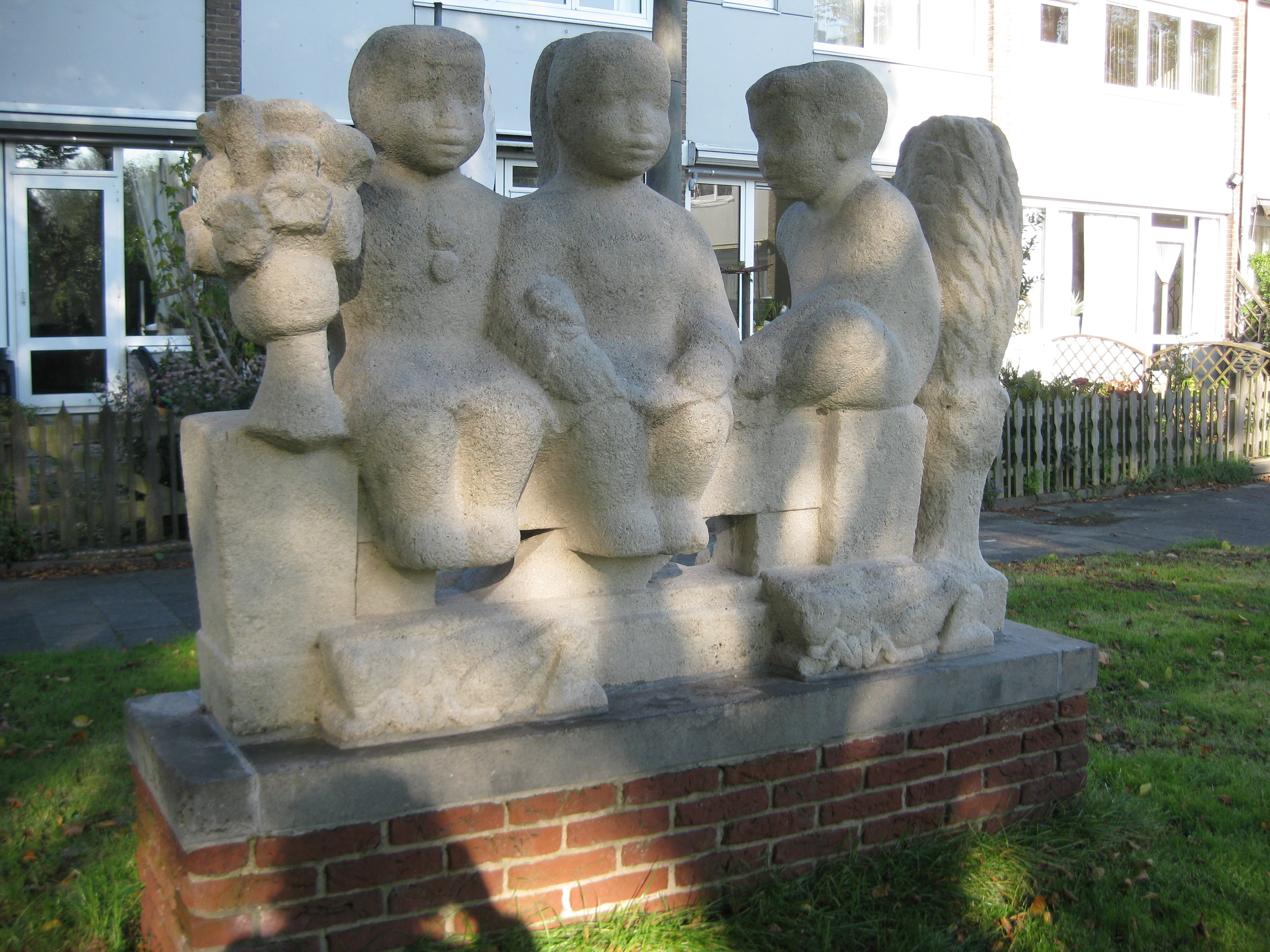 Drie kleine kleutertjes, Joop (Johannes) Hilbers 1958, Albertus Magnushof, Amsterdam-West